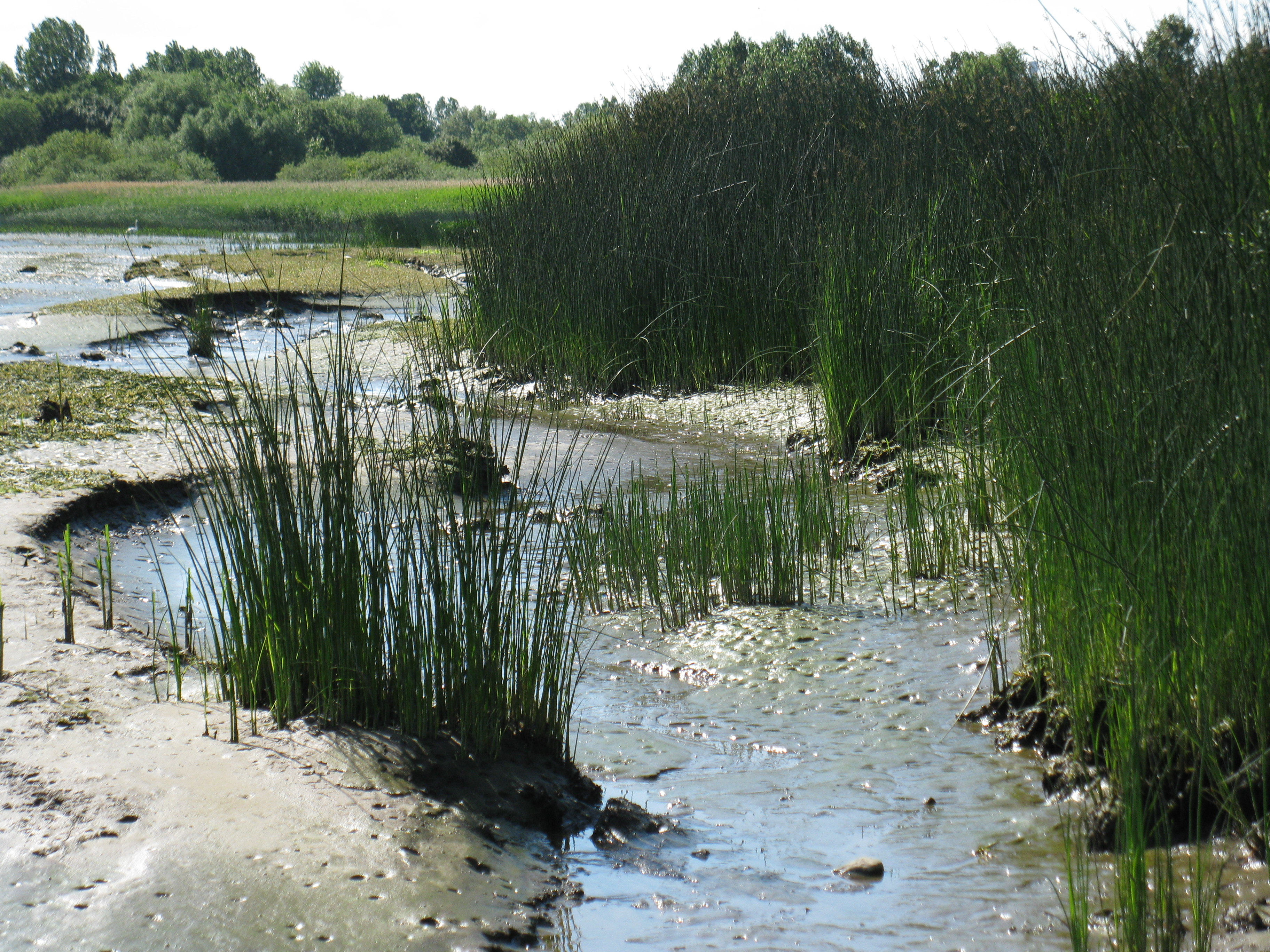 Röhricht auf Schweinesand (Insel auf der Unterelbe). Die Bäume im Hintergrund stehen bereits auf dem Neßsand.